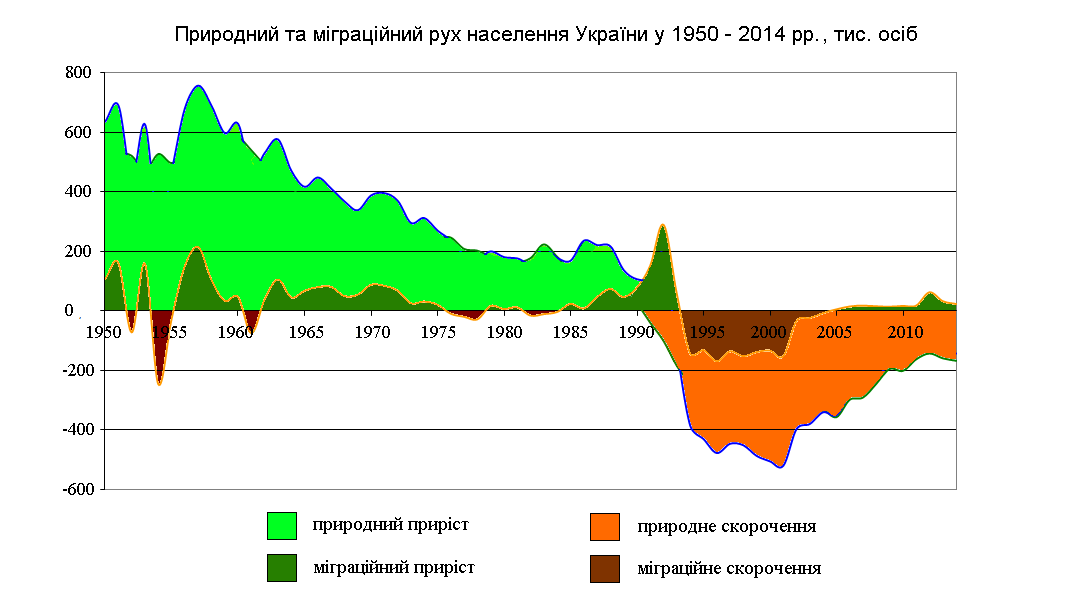 Величина природного руху та міграційного сальдо України з 1950 року